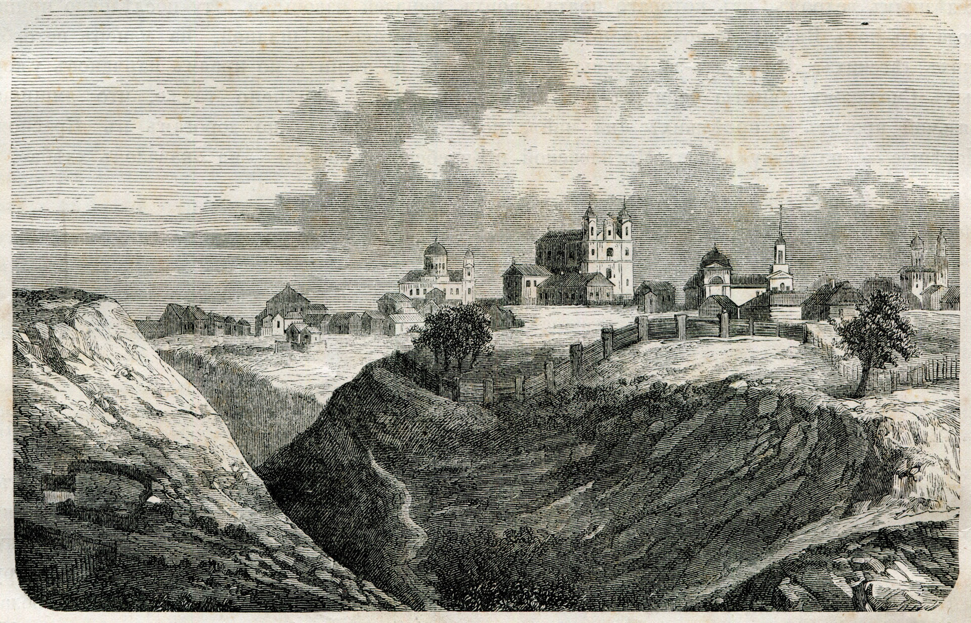 Беларуская (тарашкевіца): Амсьціслаў (Amścisłaŭ)